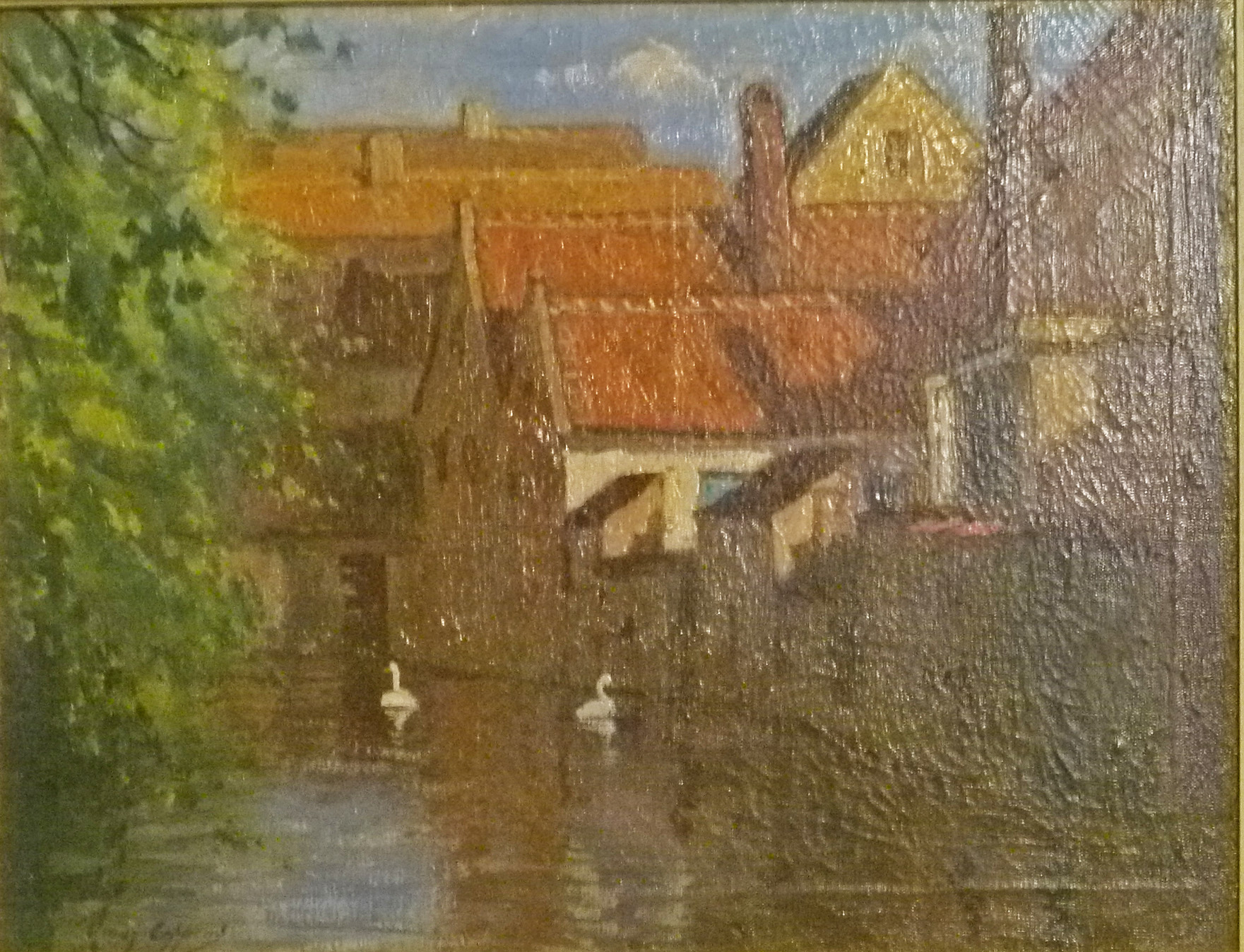 "Brugs reienzicht met witte zwanen", olieverf op doek (40 x 50 cm) door Omer Coppens (1864-1926); privécollectie